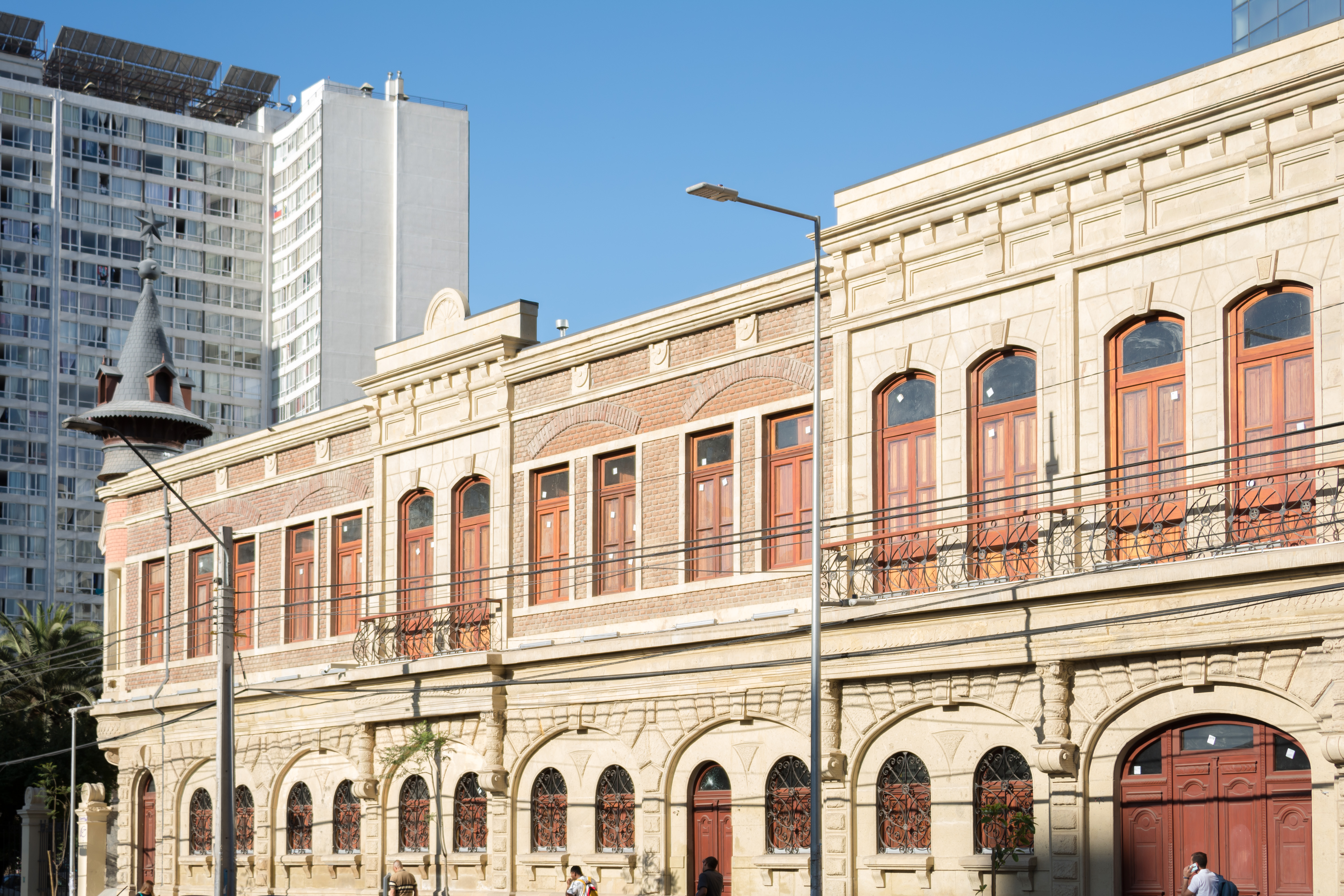 Cervecería Ebner, Santiago, Región Metropolitana de Santiago, Chile